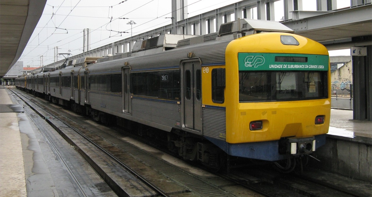 Set de UTE e UQE da linha de Cascais liderada pela 3264